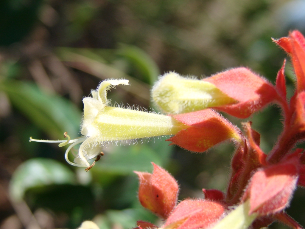 Amasonia campestris - LAMIACEAE Chapada Imperial - Distrito Federal - Brasil.